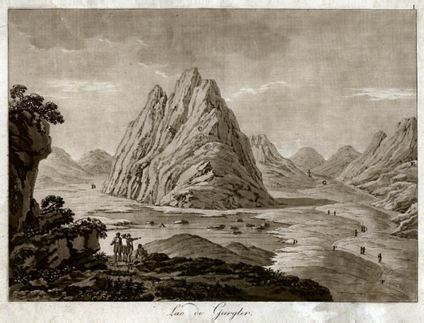 Gurgler Eissee 1780, unbekannter Künstler, Aquatintaradierung